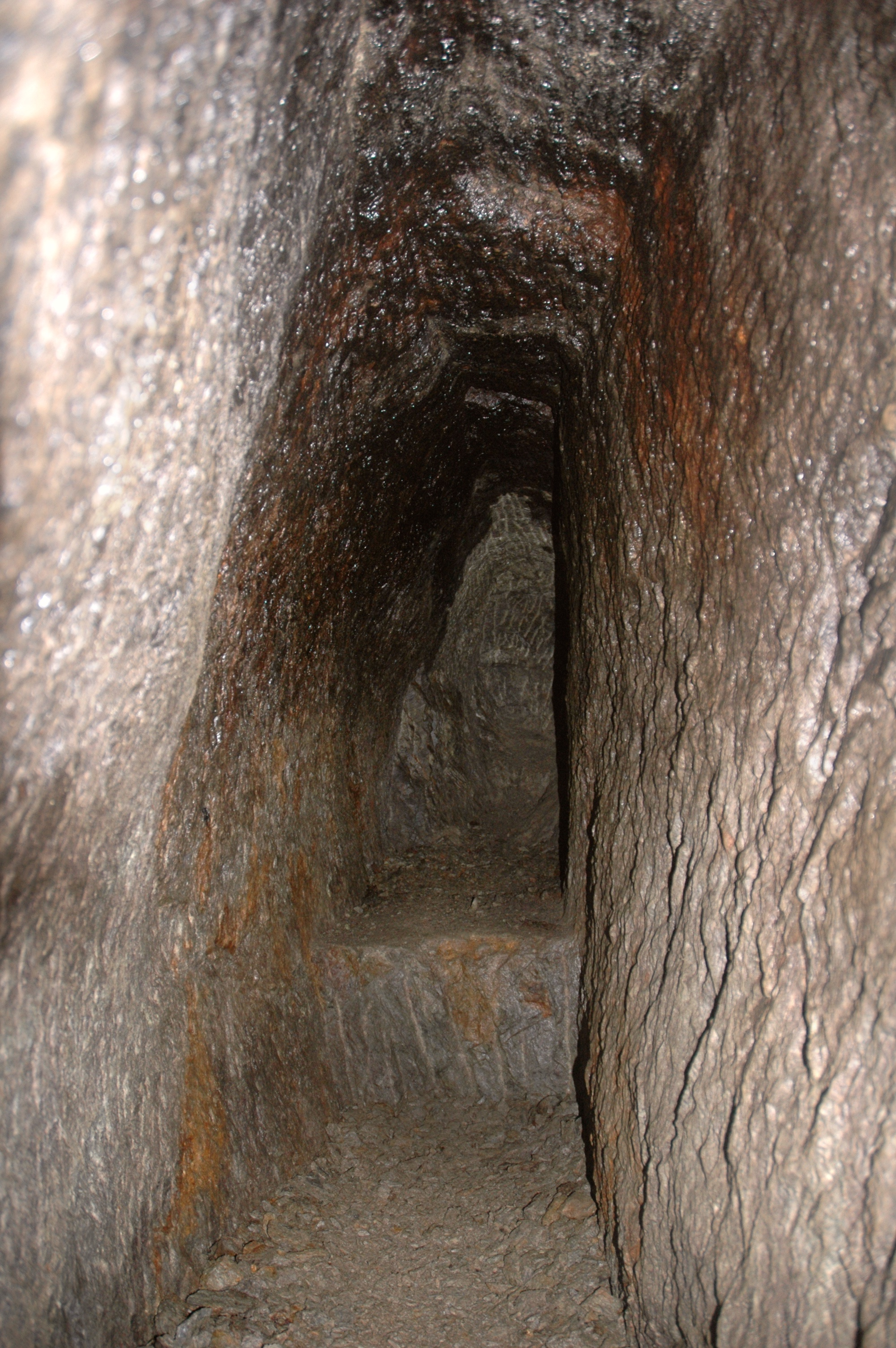 Sztolnia Czarna - Złoty Stok. Fragment chodnika z przodkiem. Poł.XVI wieku. Na przodku, stropie i ociosach ślady używania żelazka a miejscami ślady sadzy z XVI - wiecznych lampek łojowych.